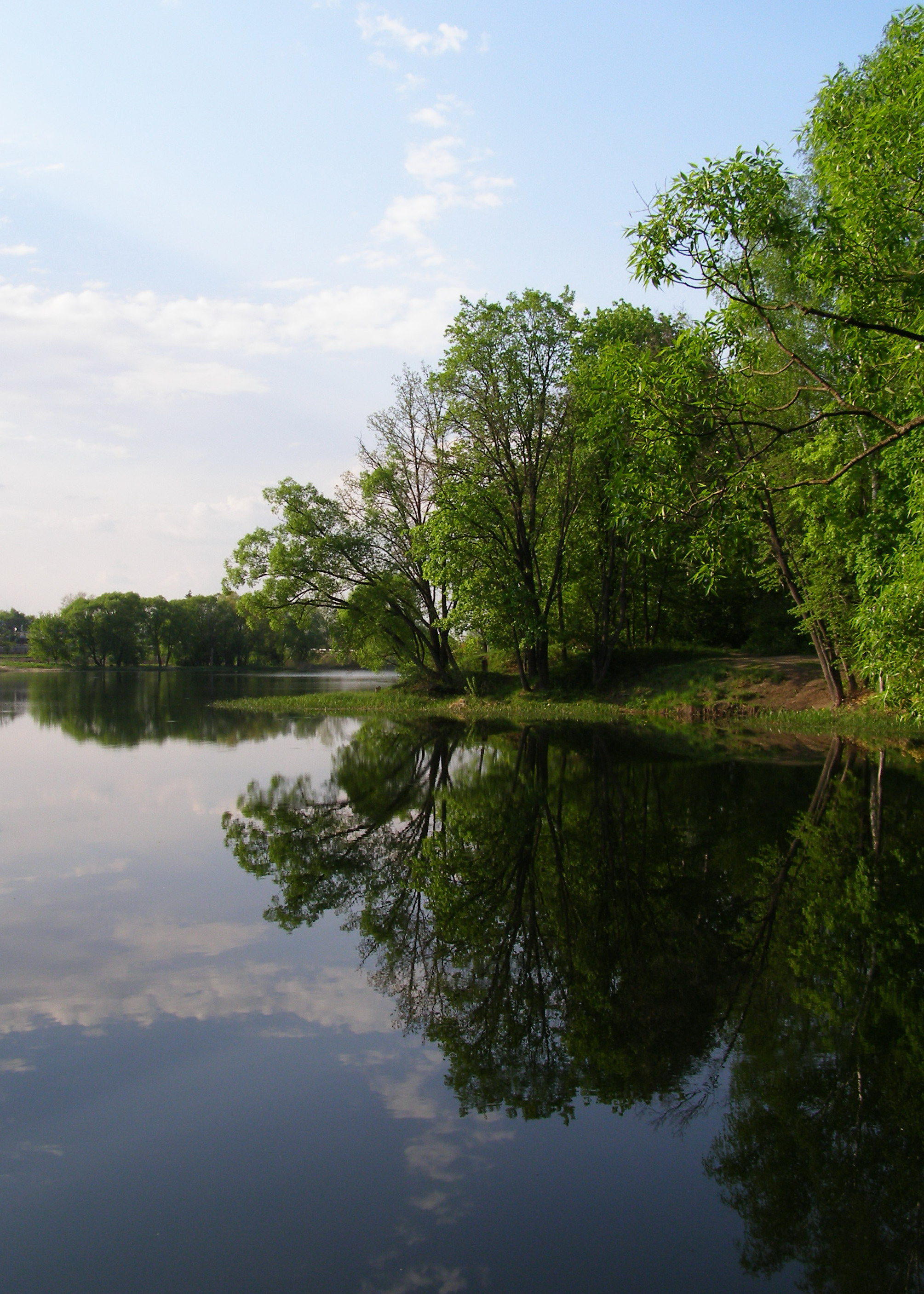 вид на усадебный пруд в Мокве (Курская обл.)